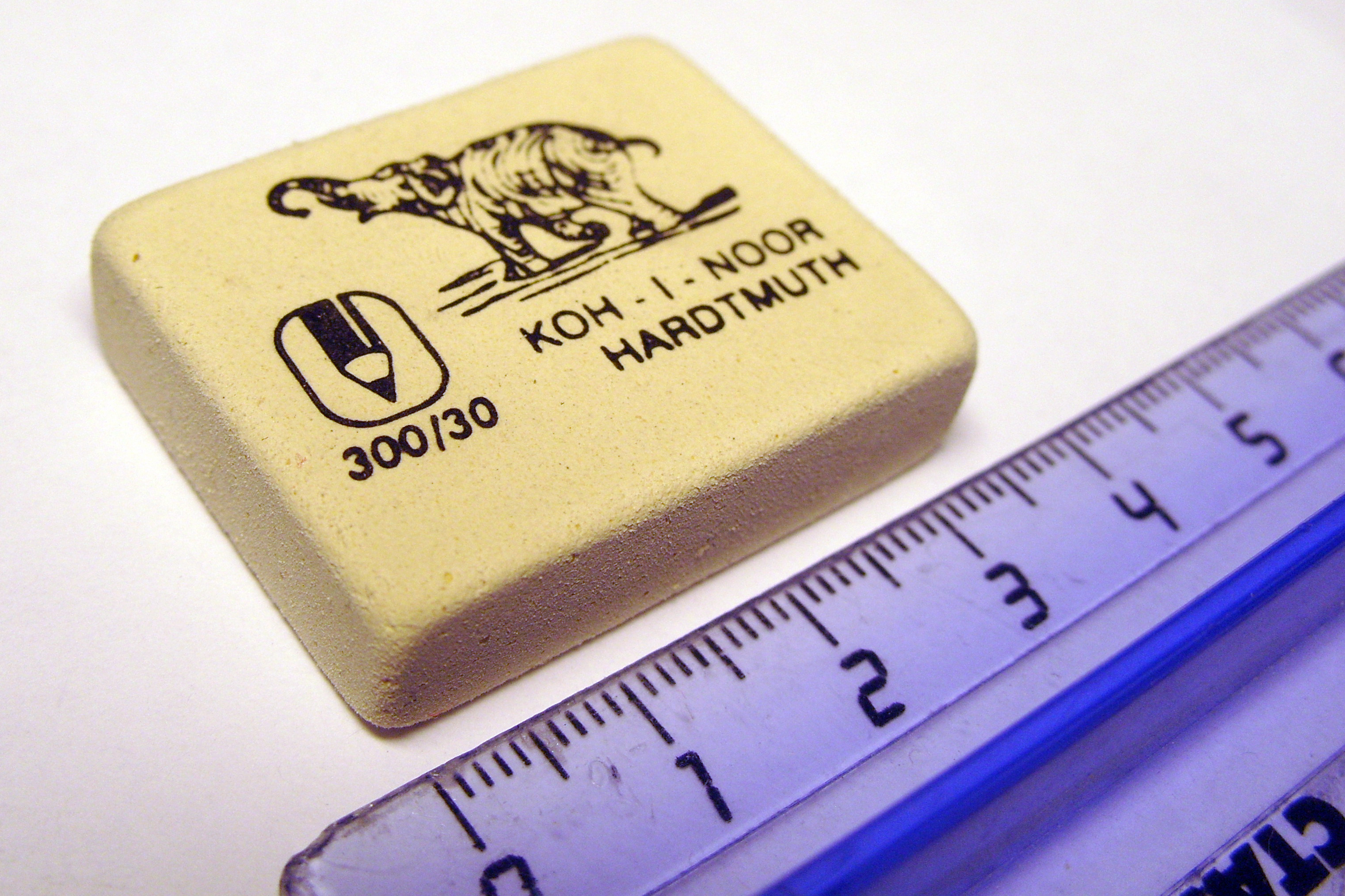 Современная стирательная резина